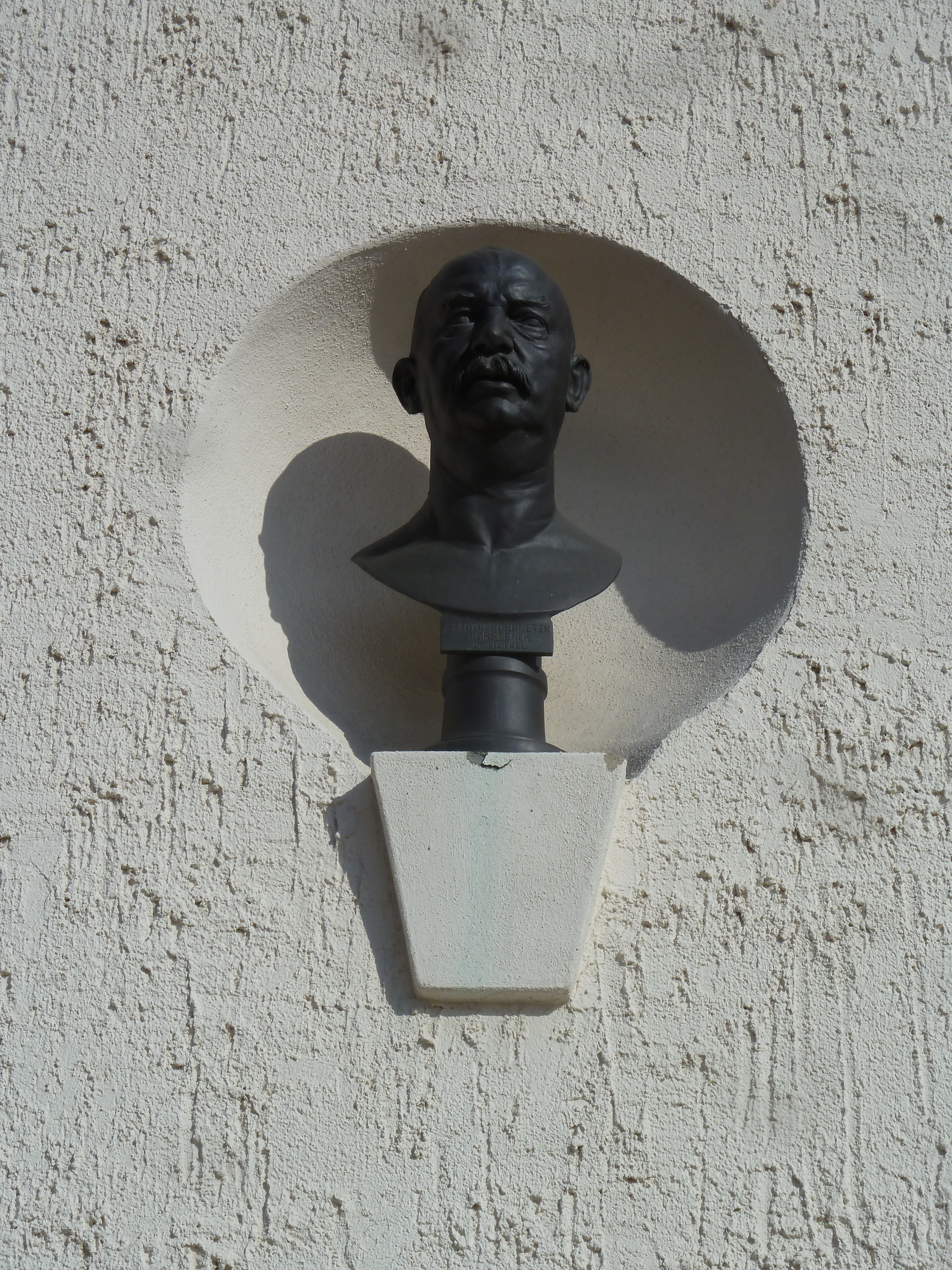 Plastik für Dr. Johannes Georg Stöckel (1855–1923; Stadtwiki Dresden) am Städtischen Vieh- und Schlachthof Dresden am Gebäude Messering 1. Inschrift: Stadtverordneter Vorsteher Dr. Stöckel